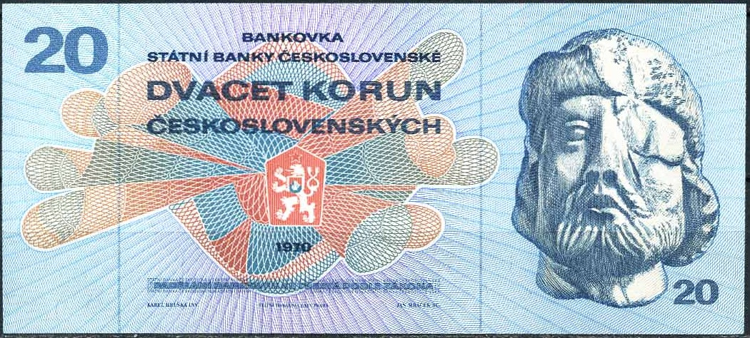 20 korun československých